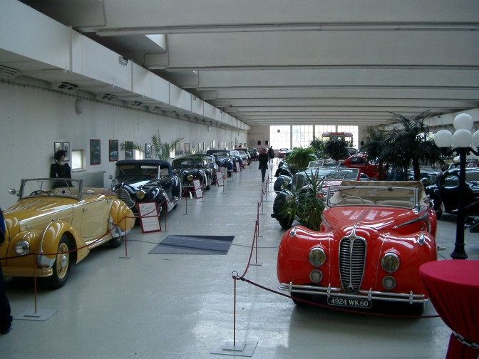 Haupthalle des Automobilmuseums Rosso Bianco in Aschaffenburg